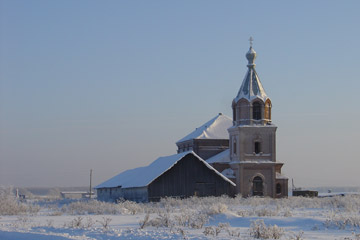 Церковь Успения Пресвятой Богородицы